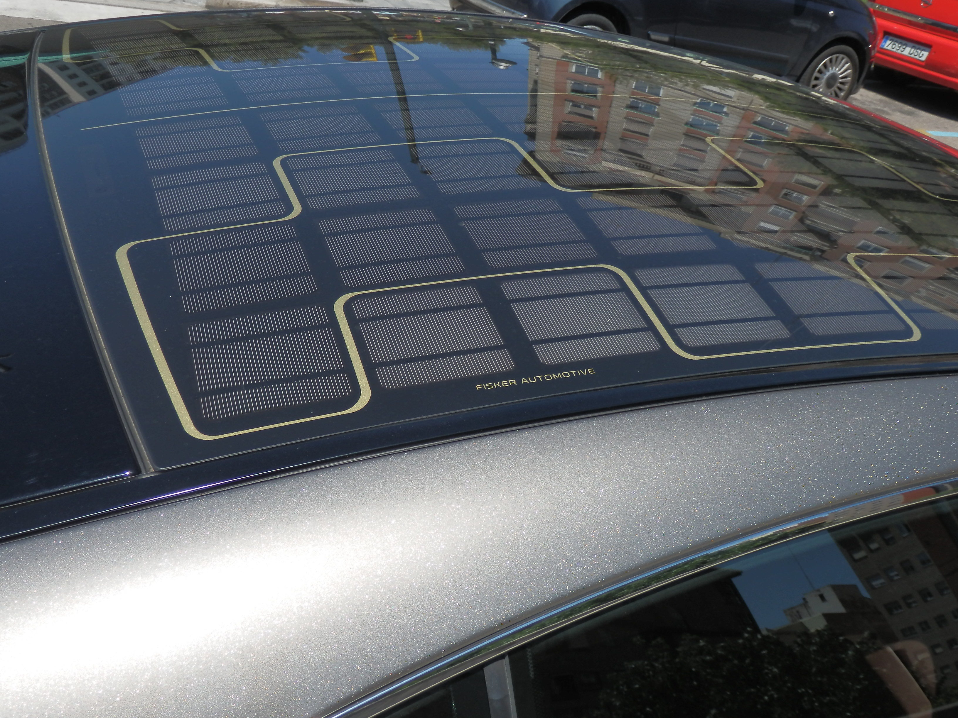 Fisker Karma EV ER.